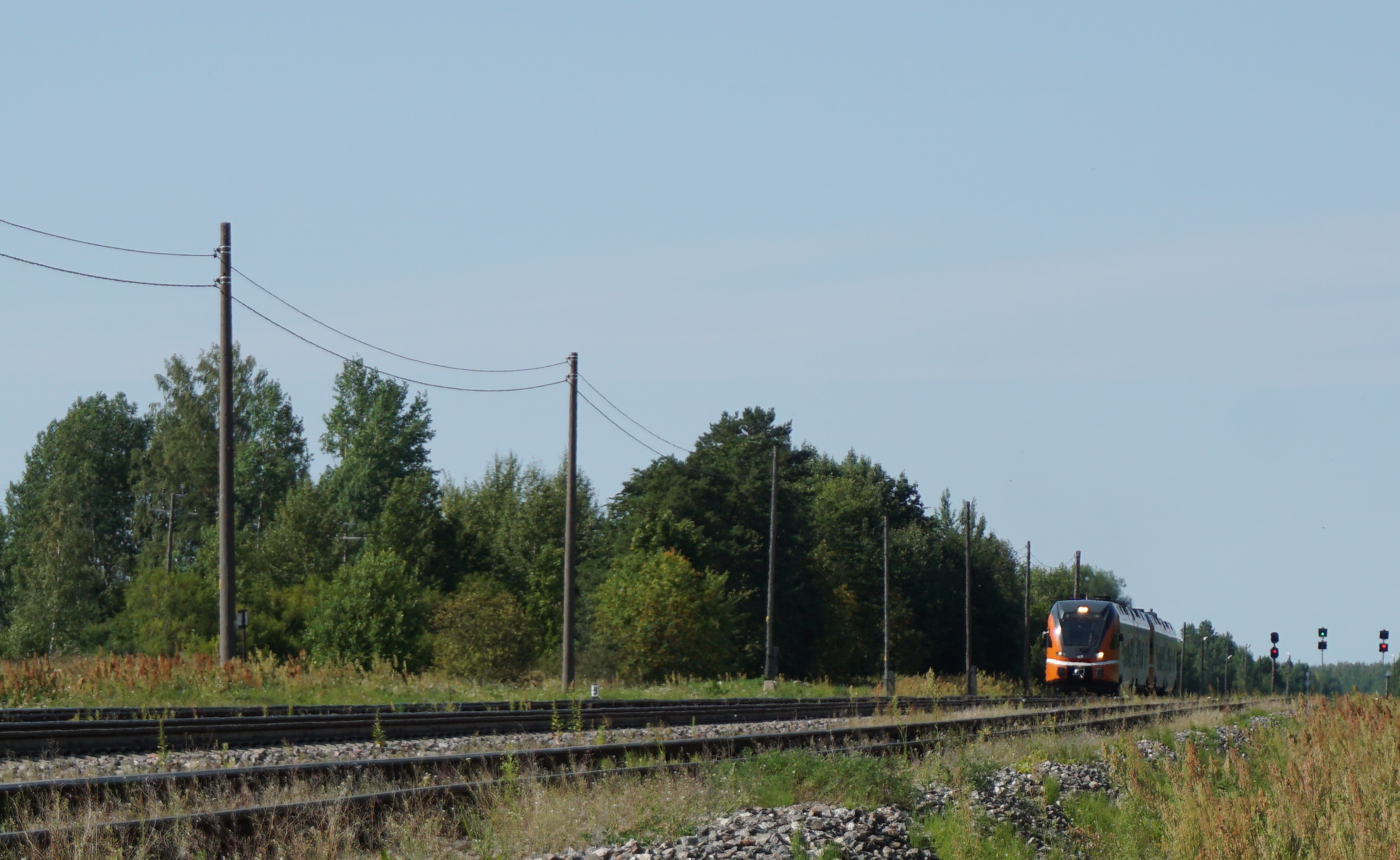 Nõmmküla jaamateed, taamal Elroni reisirong.